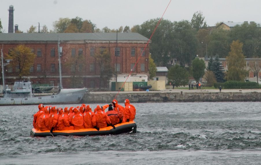 Ahti (A 431) der estnischen Marine